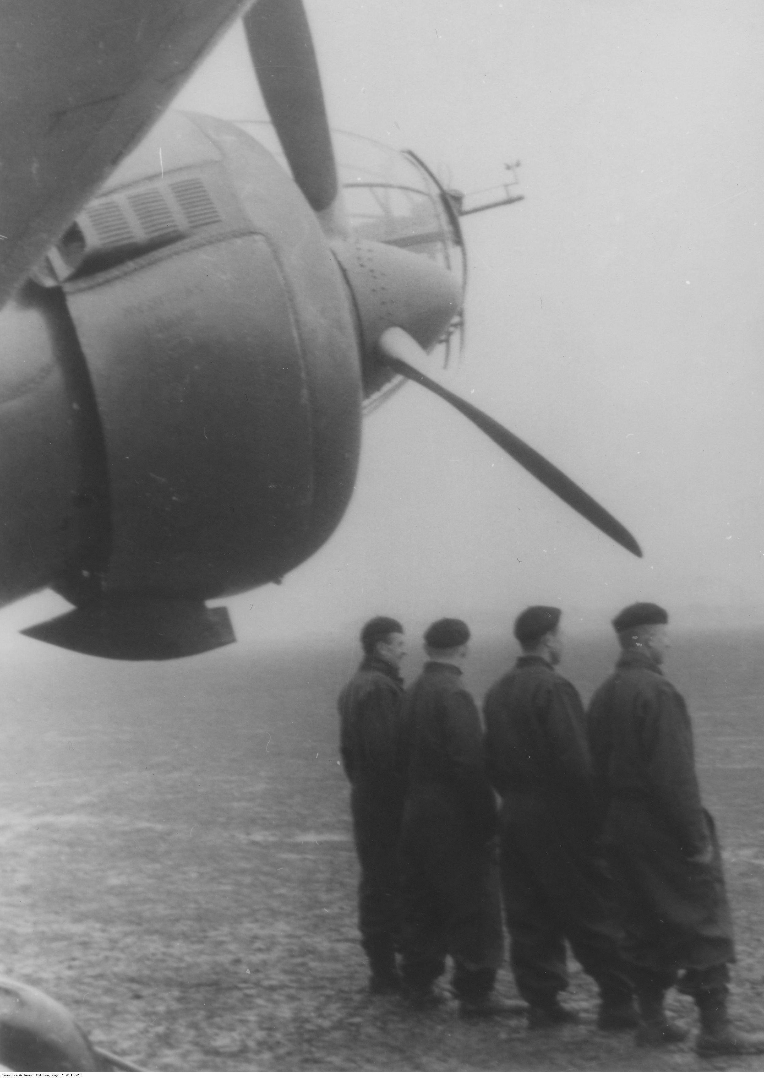 Obsługa naziemna samolotu PZL.37 Łoś przy maszynie.